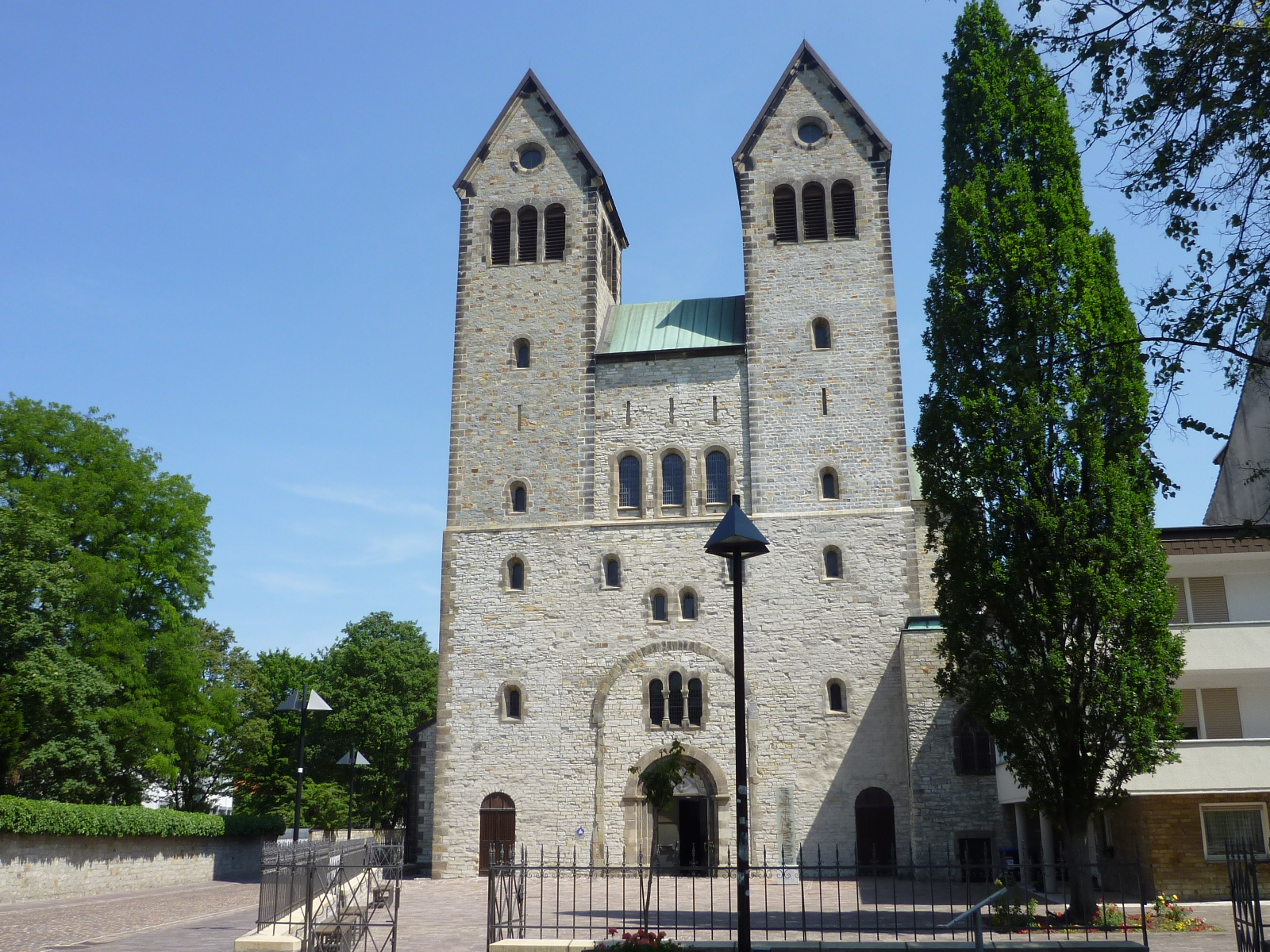 Die Abdinghofkirche in Paderborn am Abdinghof 9. This is a photograph of an architectural monument.